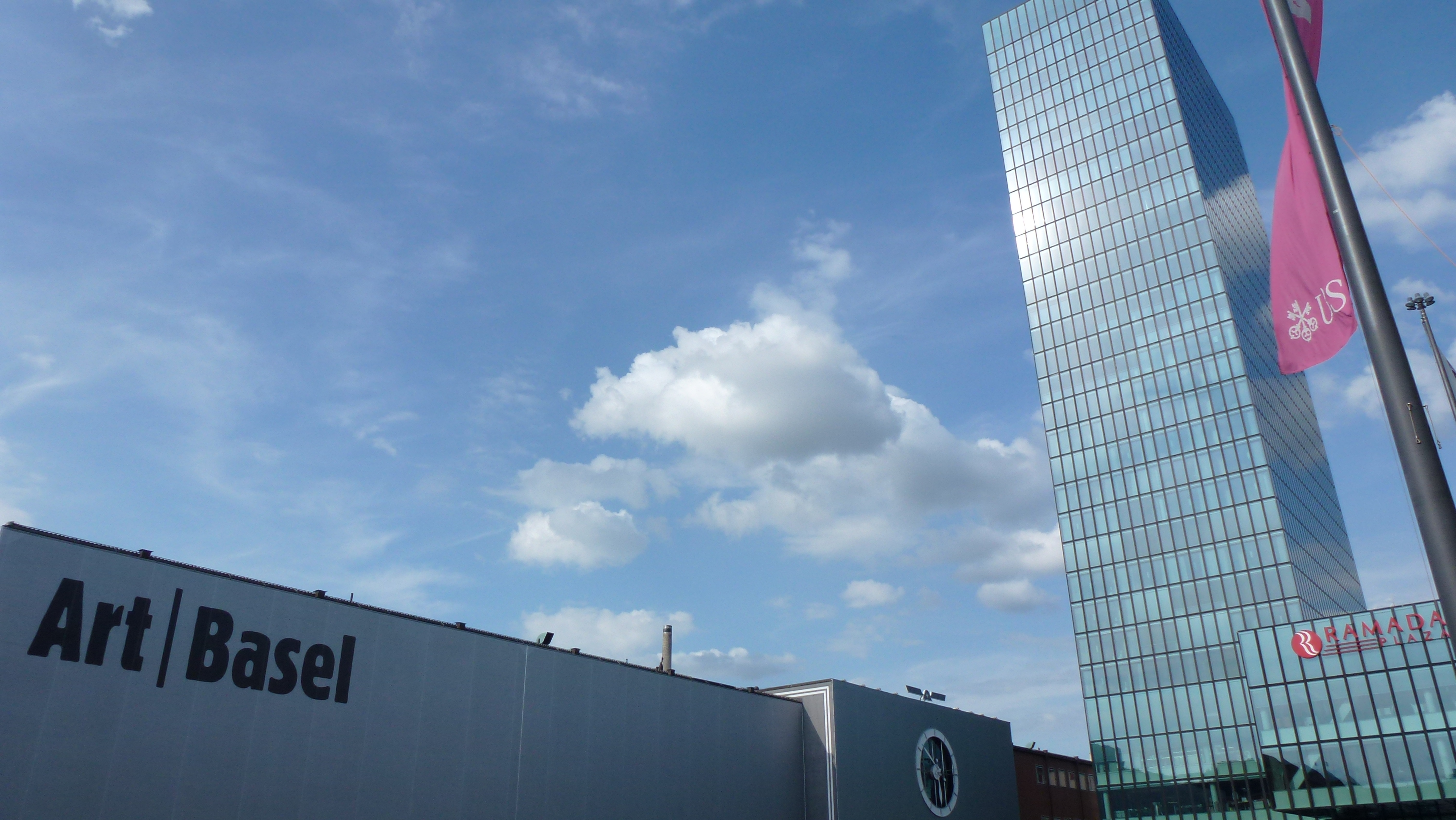 Art 42 Basel 2012. La place de la foire.